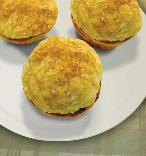 FOTO EMPADINHAS